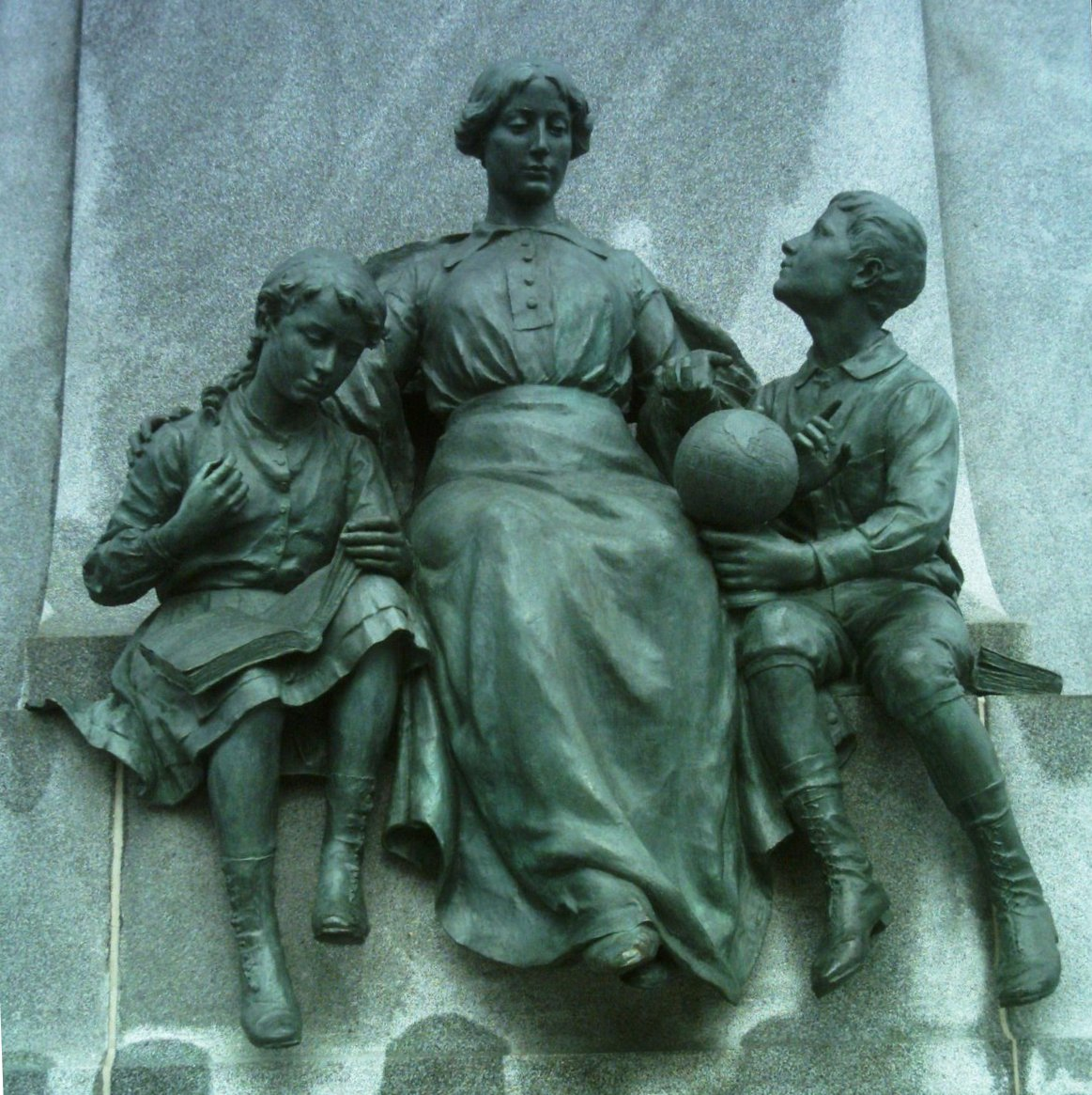 Détail sud du Monument à George-Étienne Cartier à Montréal